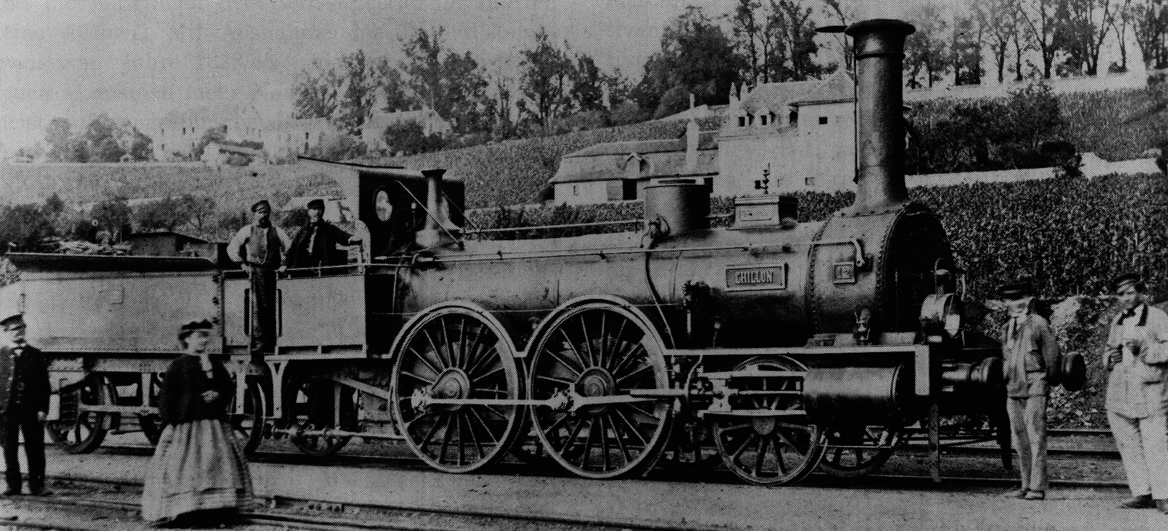 Dampflocomotive I (ab 1887 A2T) Nr. 12 Chillon, gebaut 1857 von der Maschinenbau-Gesellschaft Carlsruhe (Fabricationsnr. 45) für die Compagnie de l’Oueſt-Suisſe, 1865 zur Betribsgmeinſchafft Chemins de fer de la Suisſe Occidentale, 1881 an die Suisſe-Occidentale-Simplon, 1882 mit neuem Keſſel ausgeſtattet, 1890 als Nr. 59 an die Jura–Simplon-Bahn, 1898 außer Dienſt geſtellt und anſchließend abgebrochen.